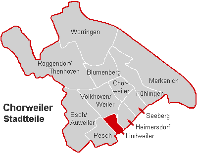 Lagekarte Lindweiler im Stadtbezirk Köln-Chorweiler